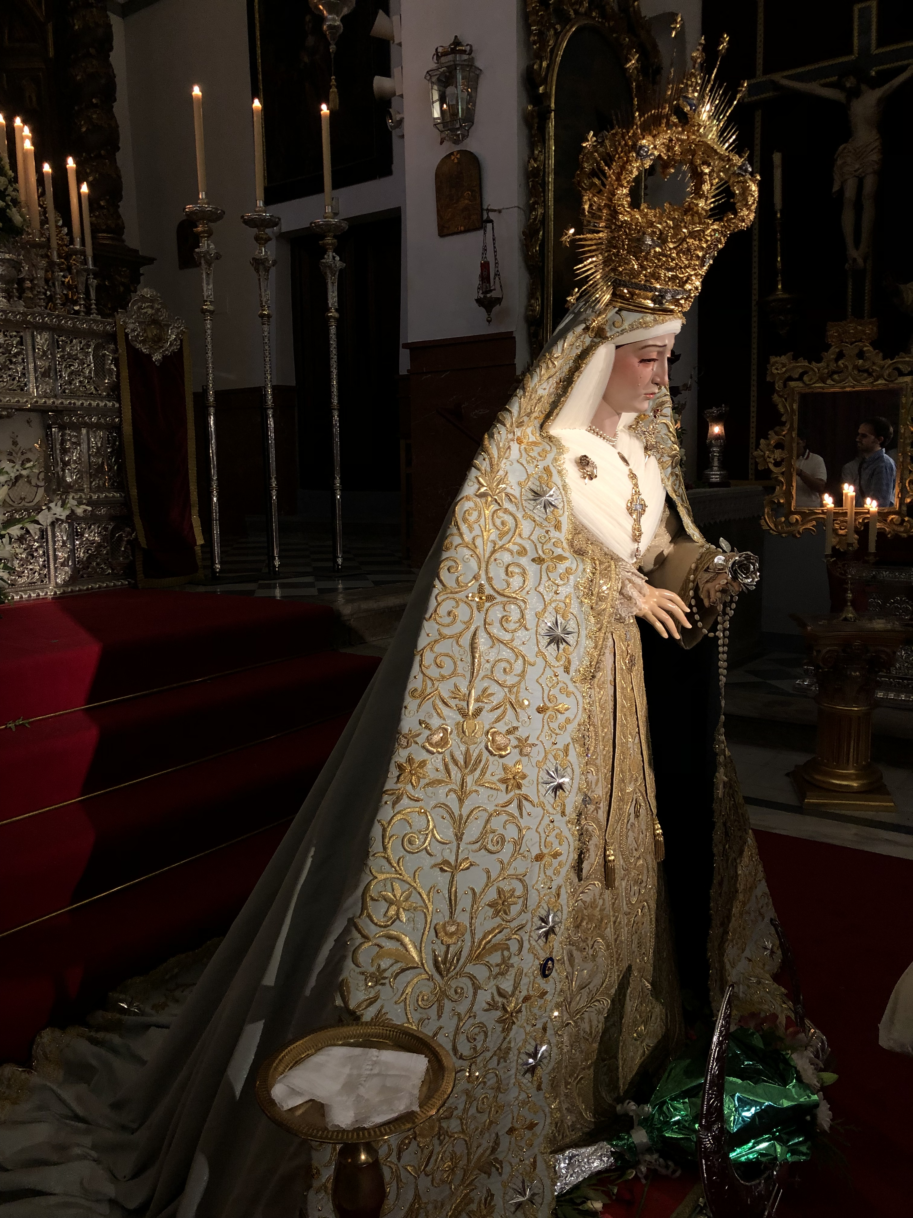 Besamanos amargura granada